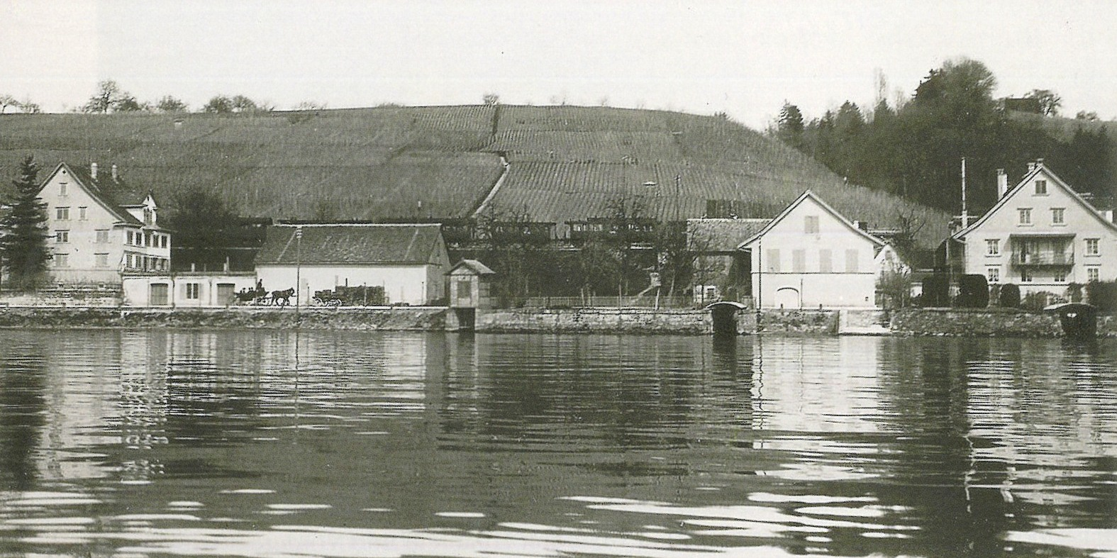 Gugger (Zollikon) In der Mitte die Eisenbahn, links ein Pferdefuhrwerk